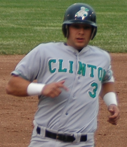 Emerson Frostad